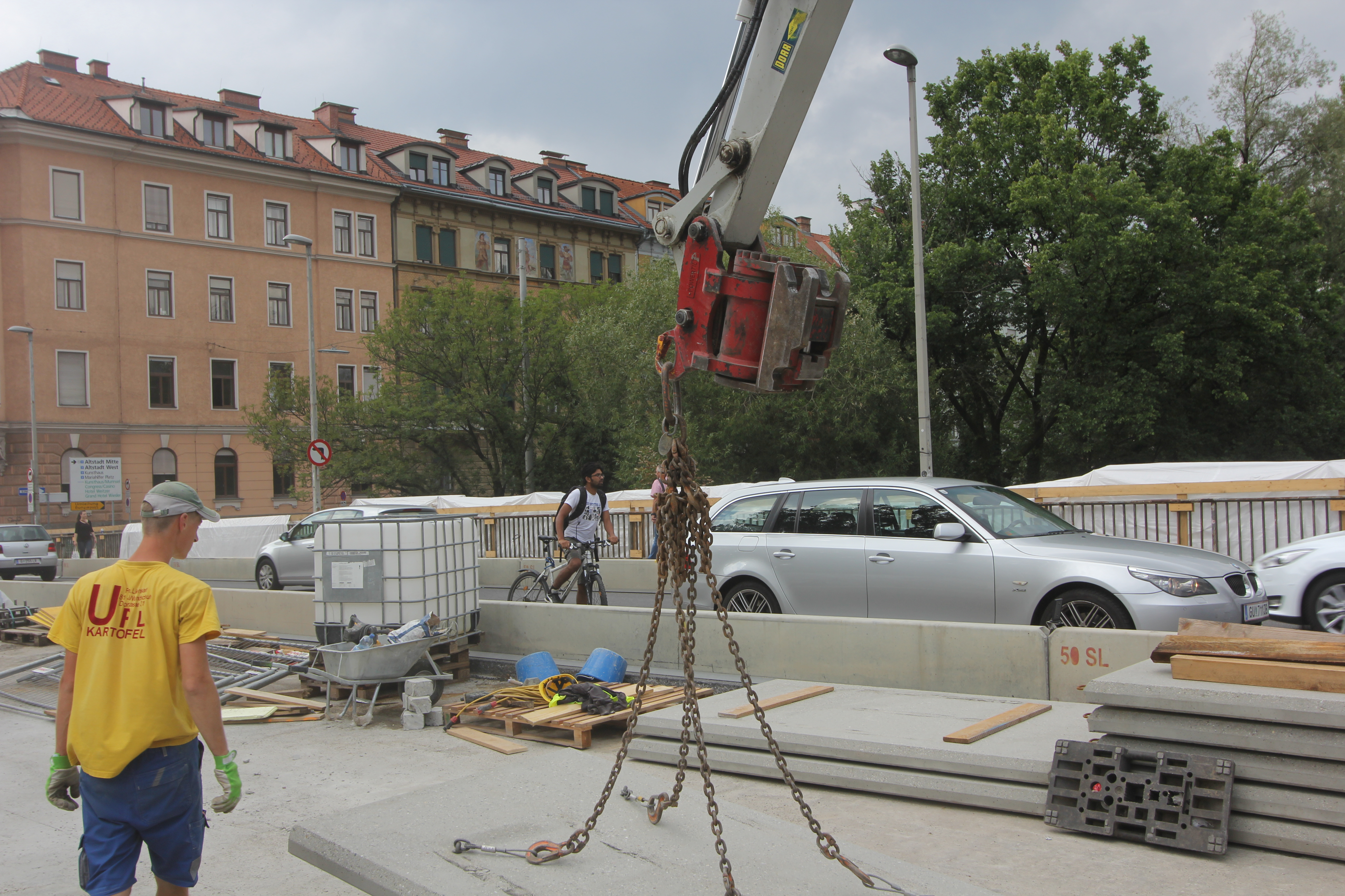 Die Baustelle auf der Keplferbrücke befindet sich bereits im Endspurt - durchhalten.